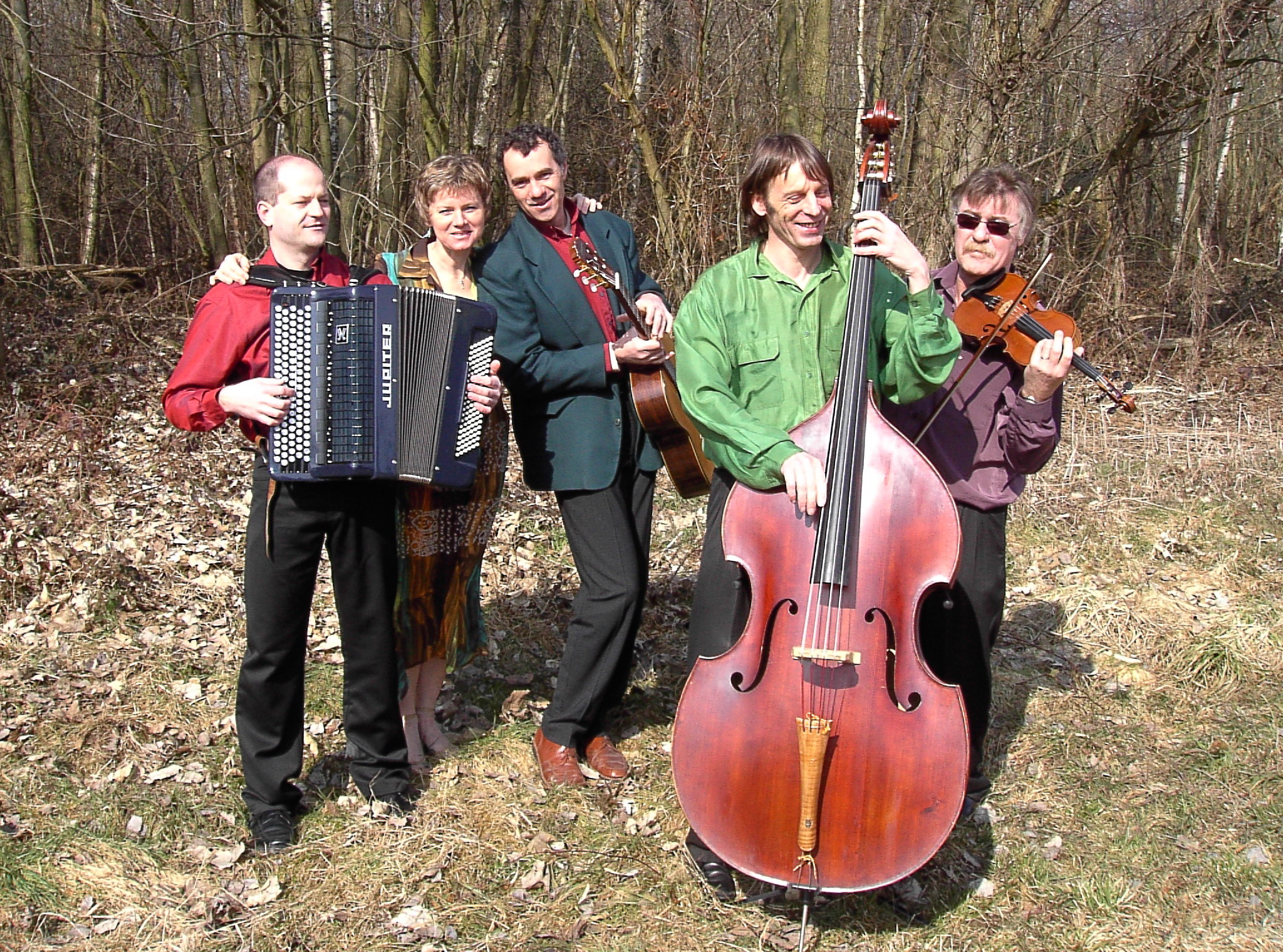 Géranium quintette Fresch Uff